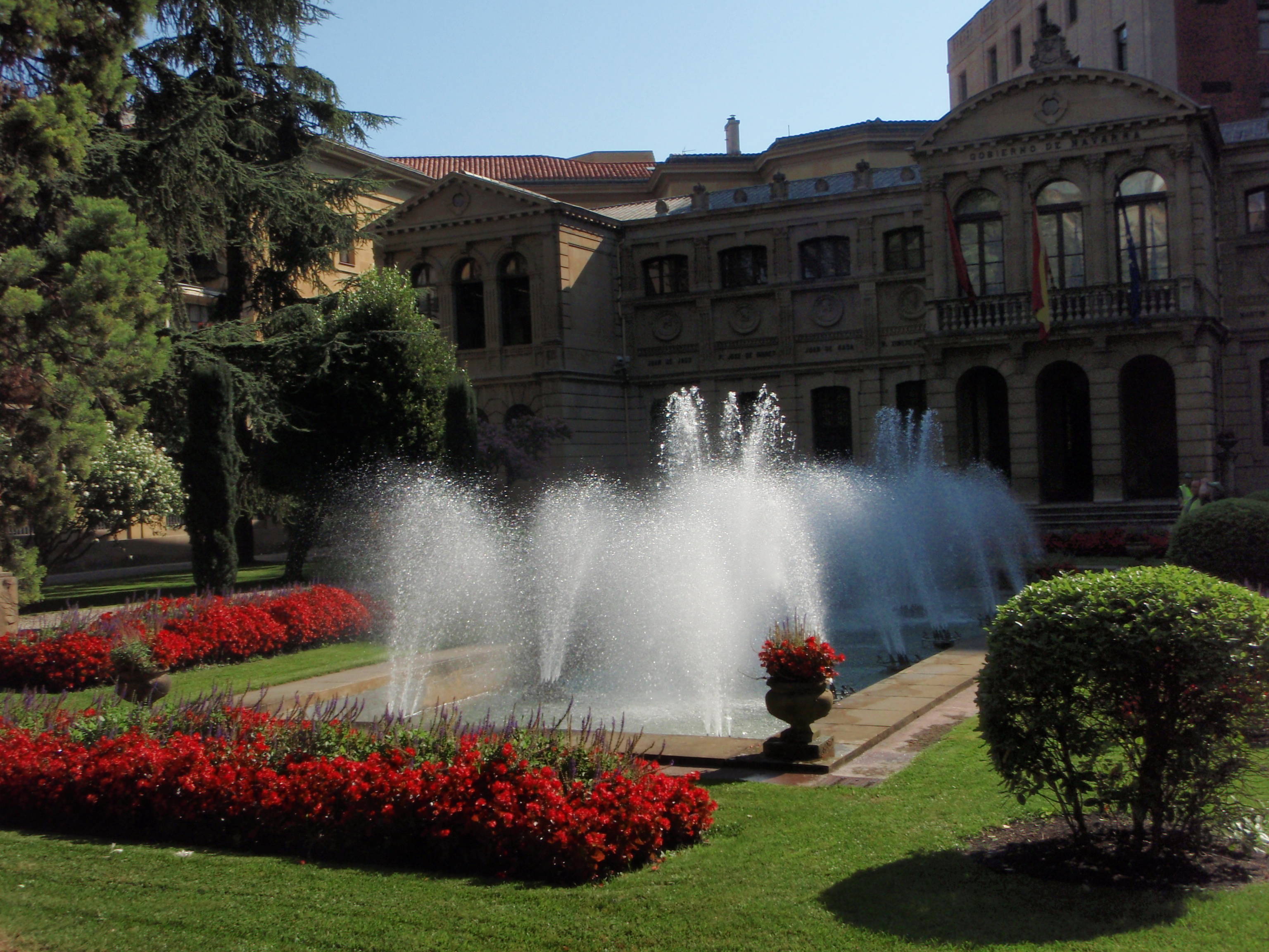 Pamplona